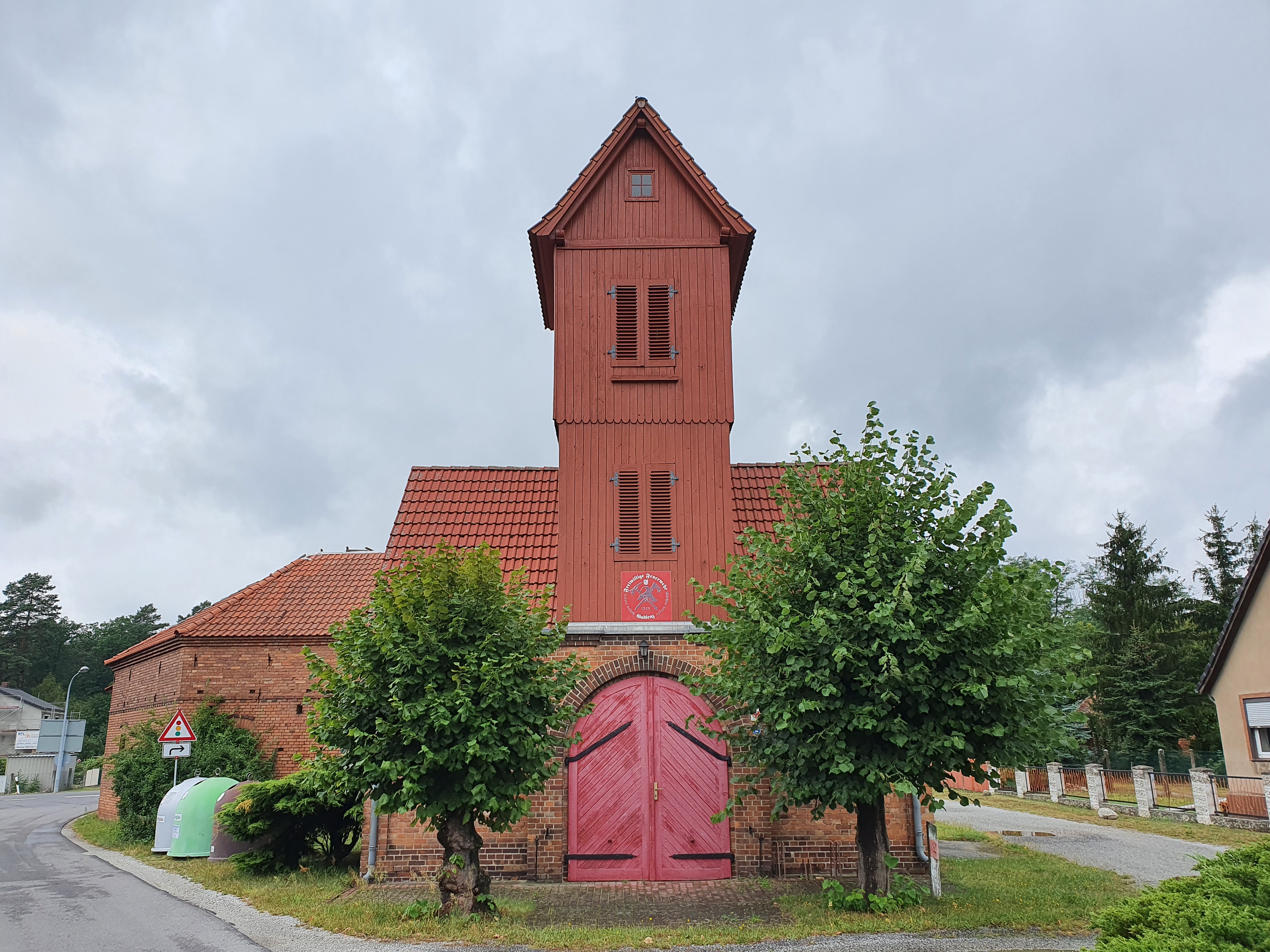 Das Gerätehaus der Freiwilligen Feuerwehr Gablenz in der Gemeinde Neuhausen/Spree im Landkreis Spree-Neiße in Brandenburg, südlich von Cottbus.